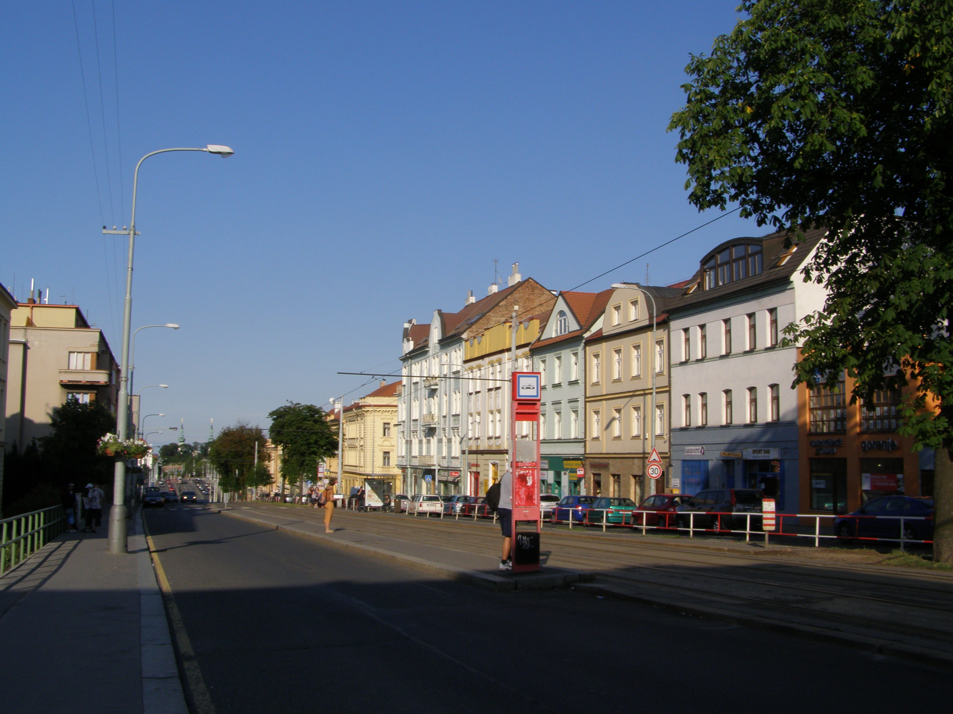 Praha, Břevnov, ulice Bělohorská, lokalita Marjánka